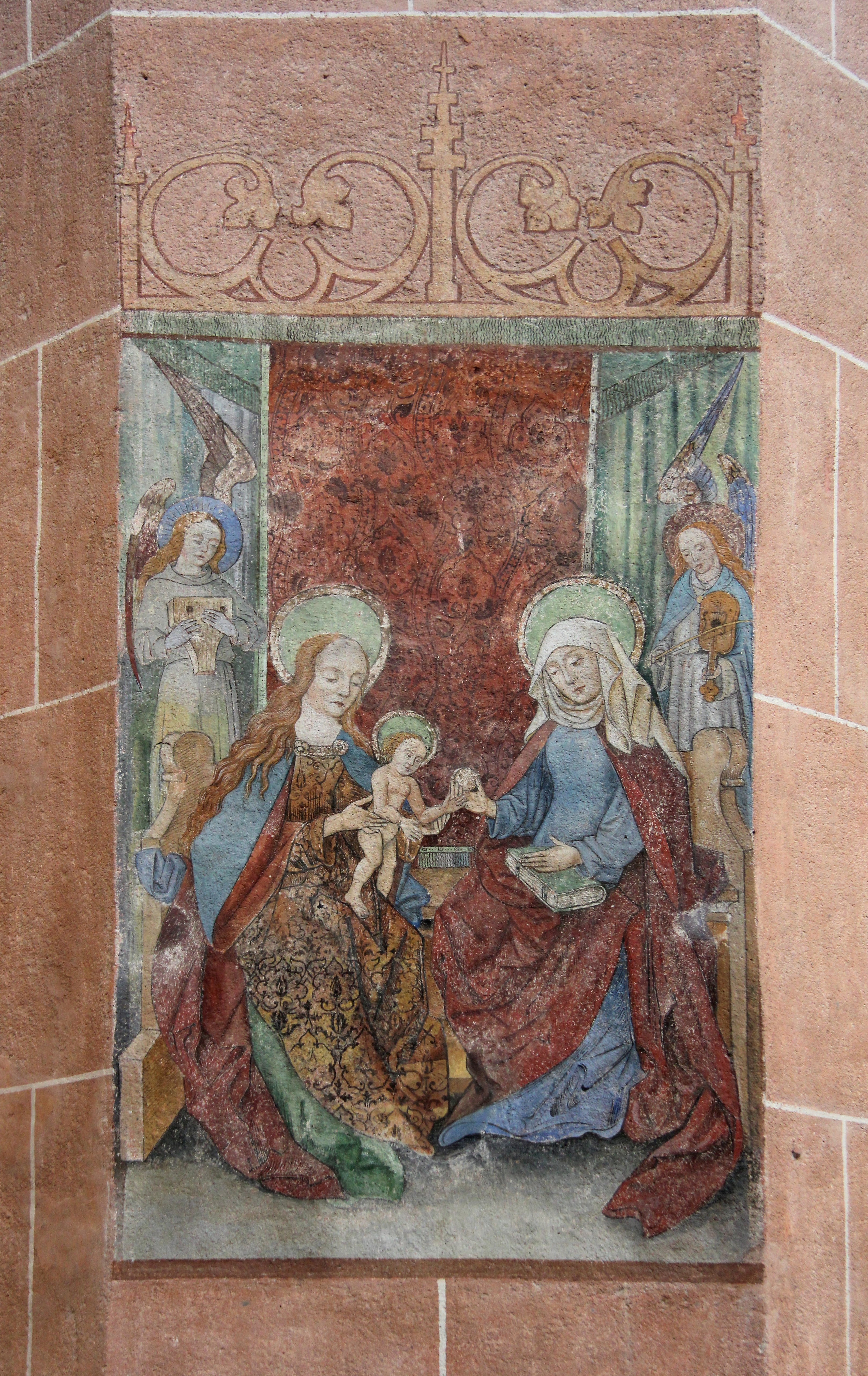 Anna selbdritt, Fresko in der Kirche St. Martin, Oberwesel